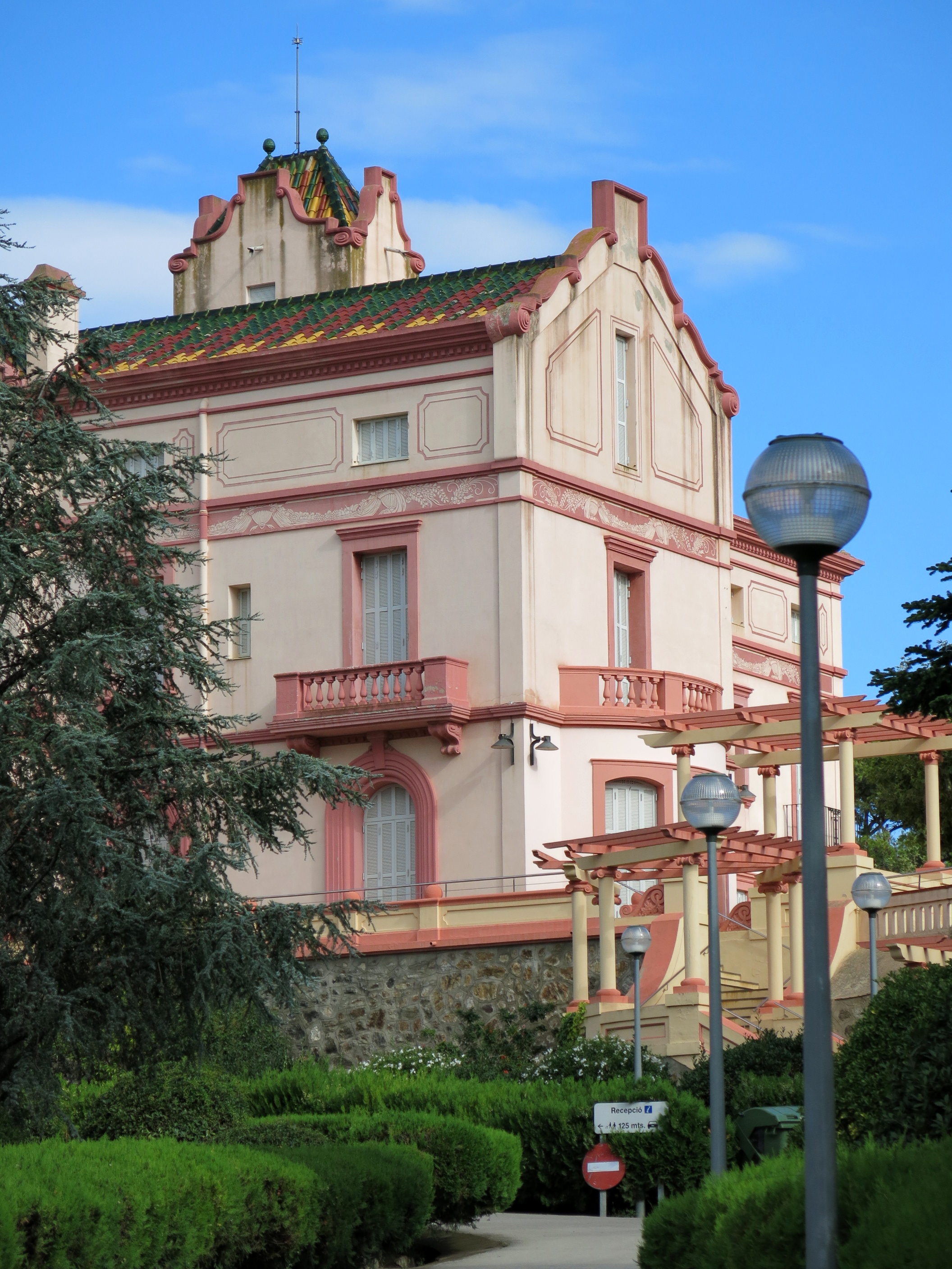 Casa Marly (Llançà)